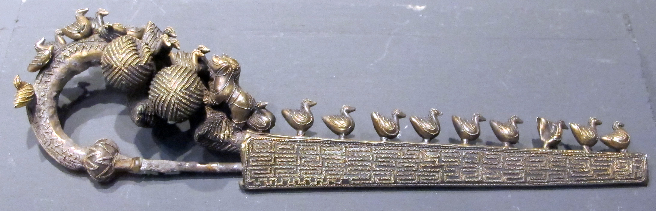 Museo Archeologico, Firenze